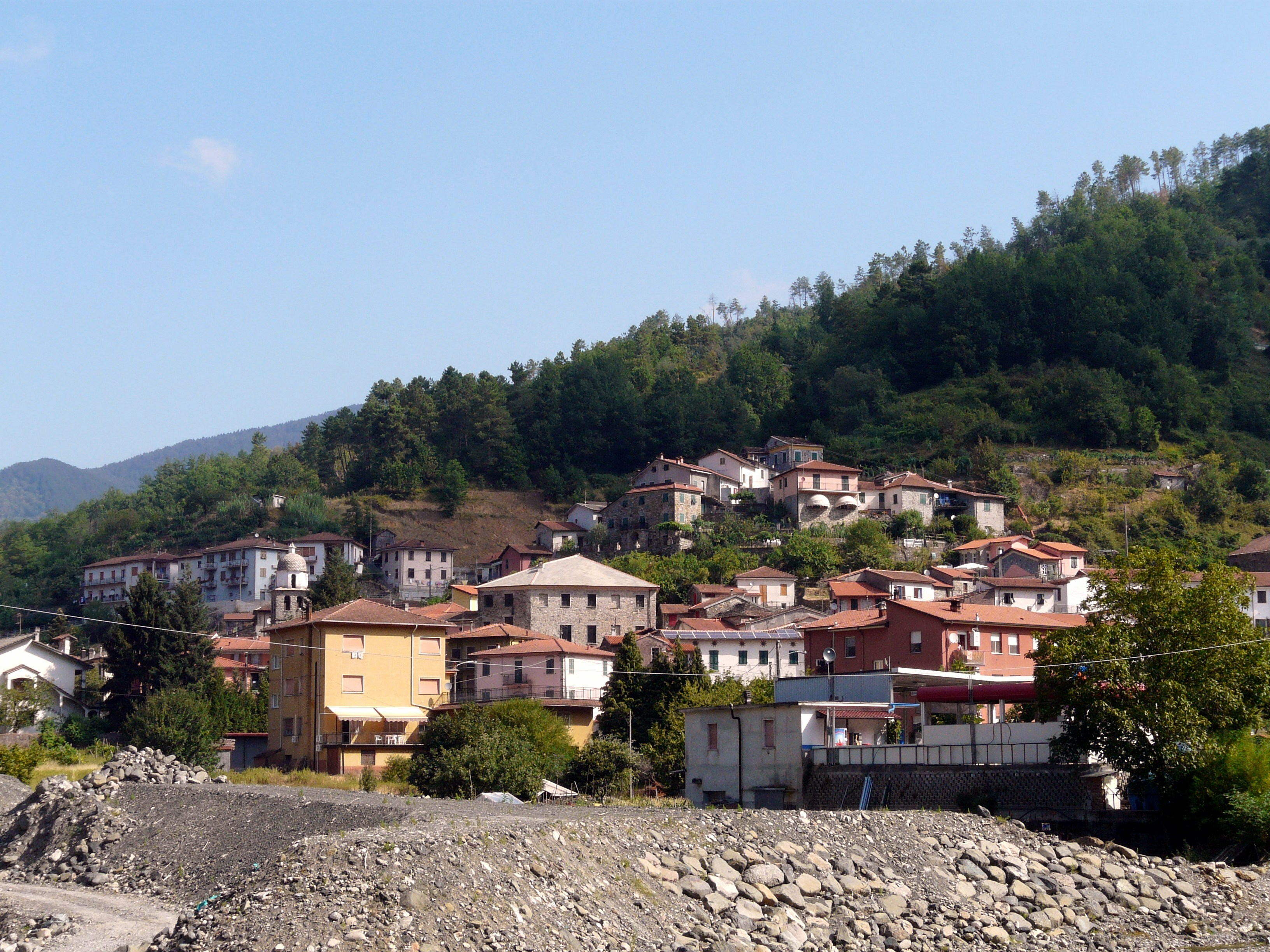 Panorama di Rocchetta di Vara, Liguria, Italia